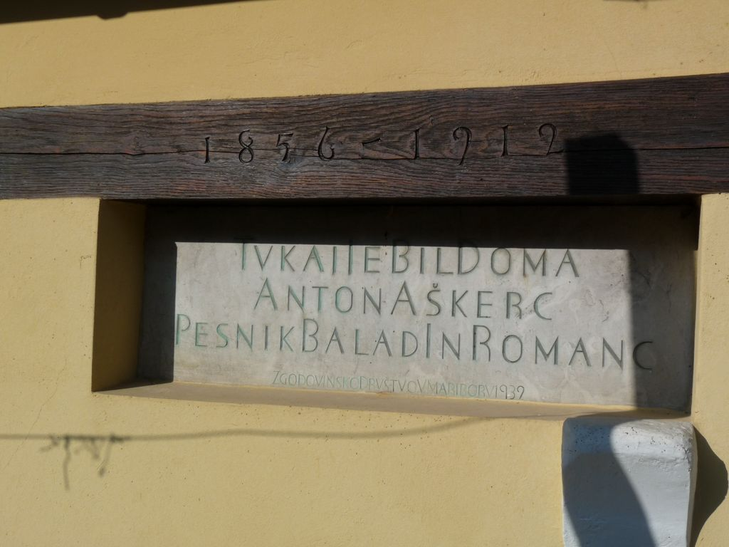 Obeležje na Aškerčevi domačiji, Senožete.